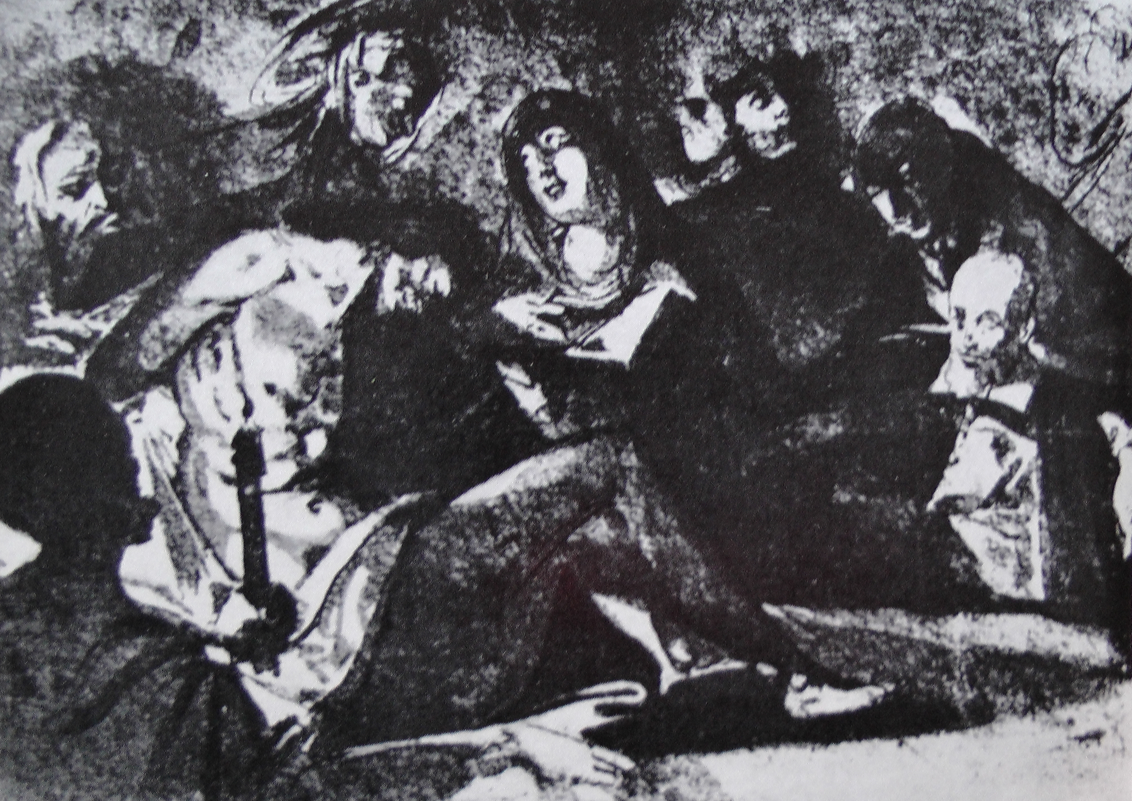 Jacques Bellange (около 1575 — 1616). Пьета с донатором (рисунок). Дижон, Музей изящных искусств.